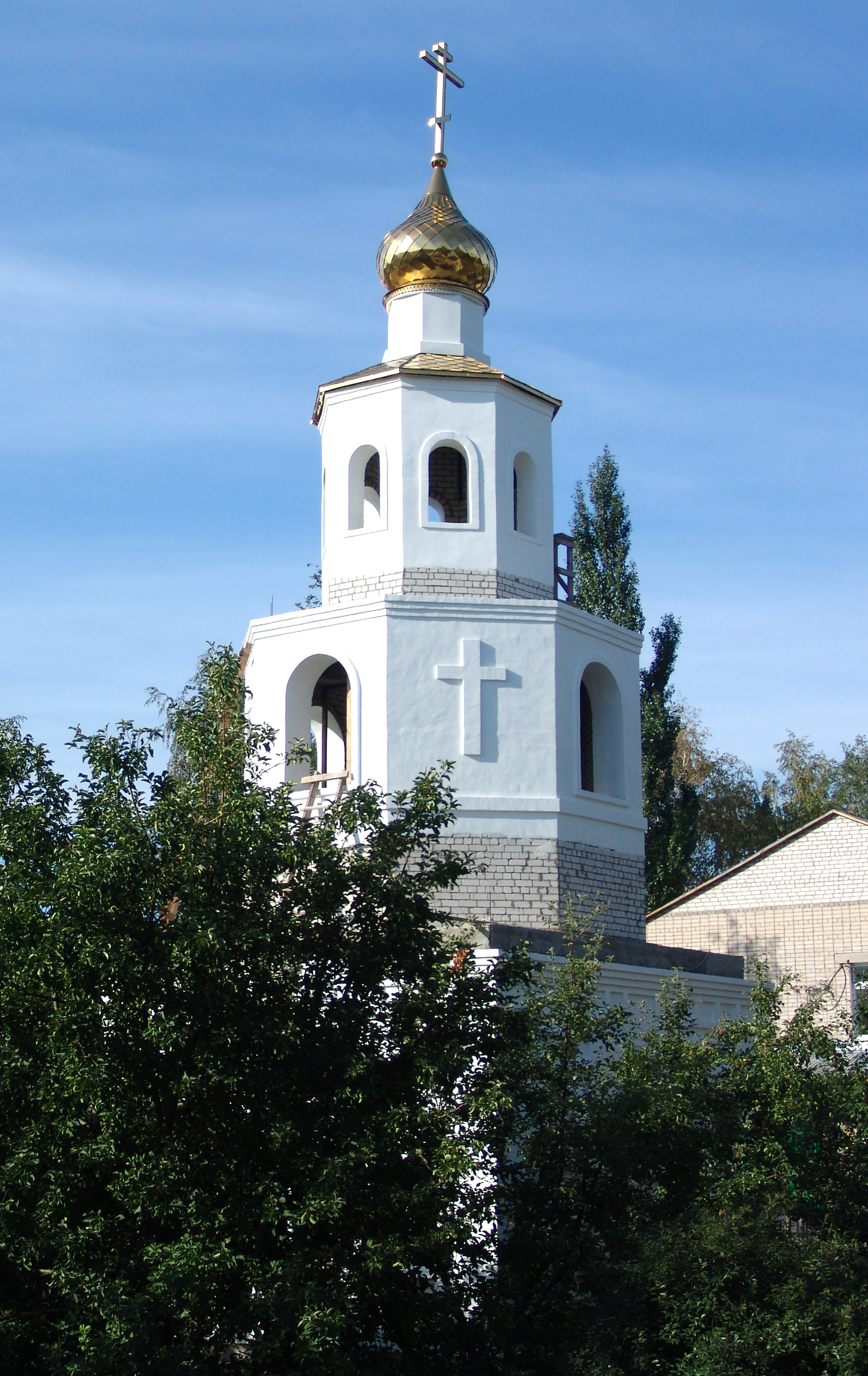 Шигоны, колокольня храма Святого Архангела Михаила.